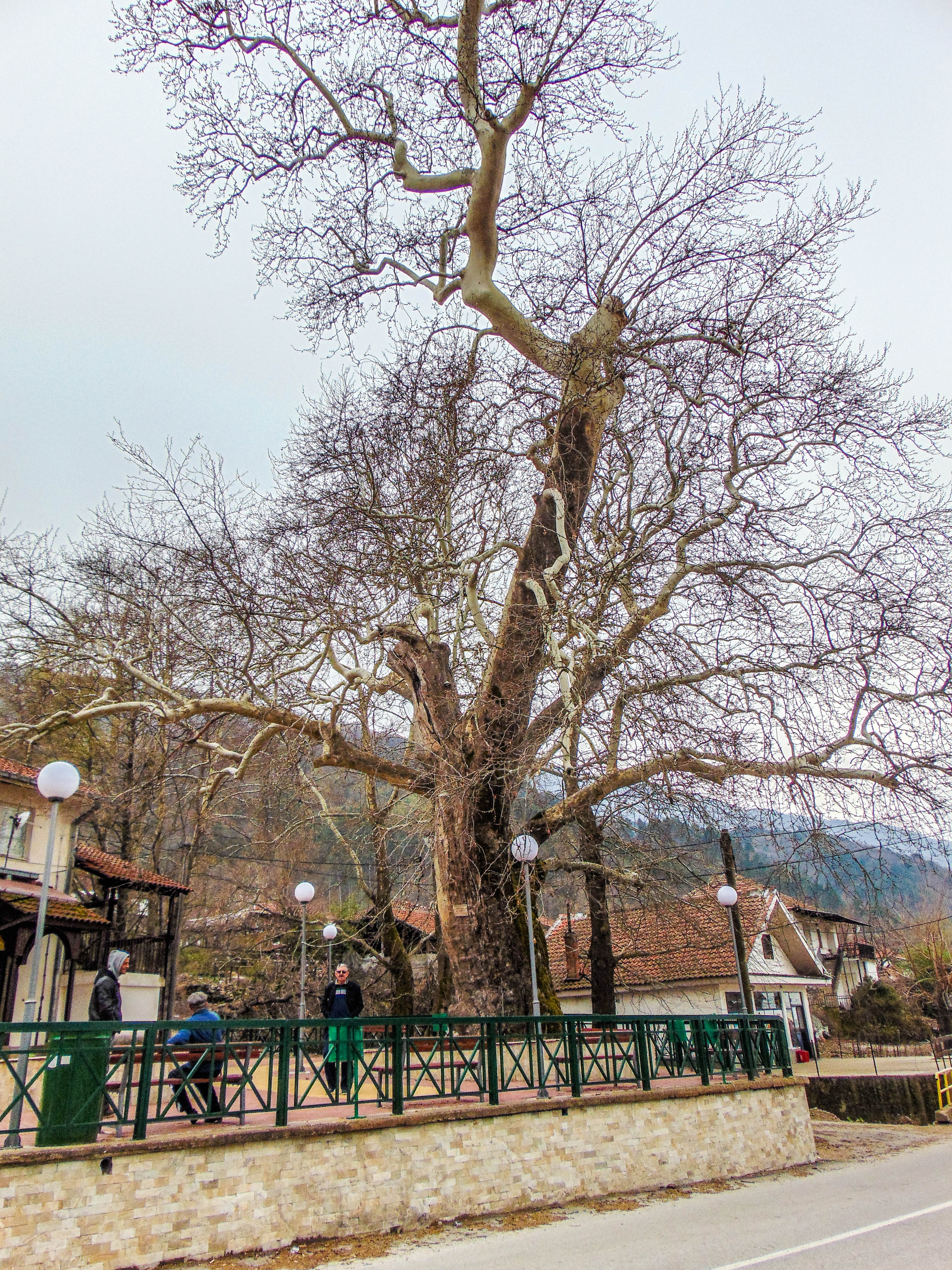 Дражево